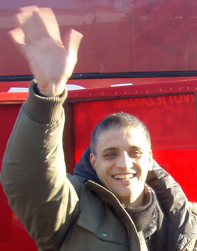 Чедомир Јовановић у Горњем Милановцу, током предизборне кампање за председника Србије, 2008. године. Снимио Ранко Томић.